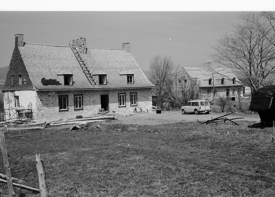 Fin des restaurations des deux maisons historiques, mai 1962. En premier plan: L'Âtre (maison Drouin-Rouleau) et à l'arrière plan La Brimbale (maison Morency-Morrisset), Sainte-Famille (Canada). Photo Jean-Antoine Demers. (Protection MH classé. Voir la liste des lieux patrimoniaux de la Capitale-Nationale pour plus de détails).